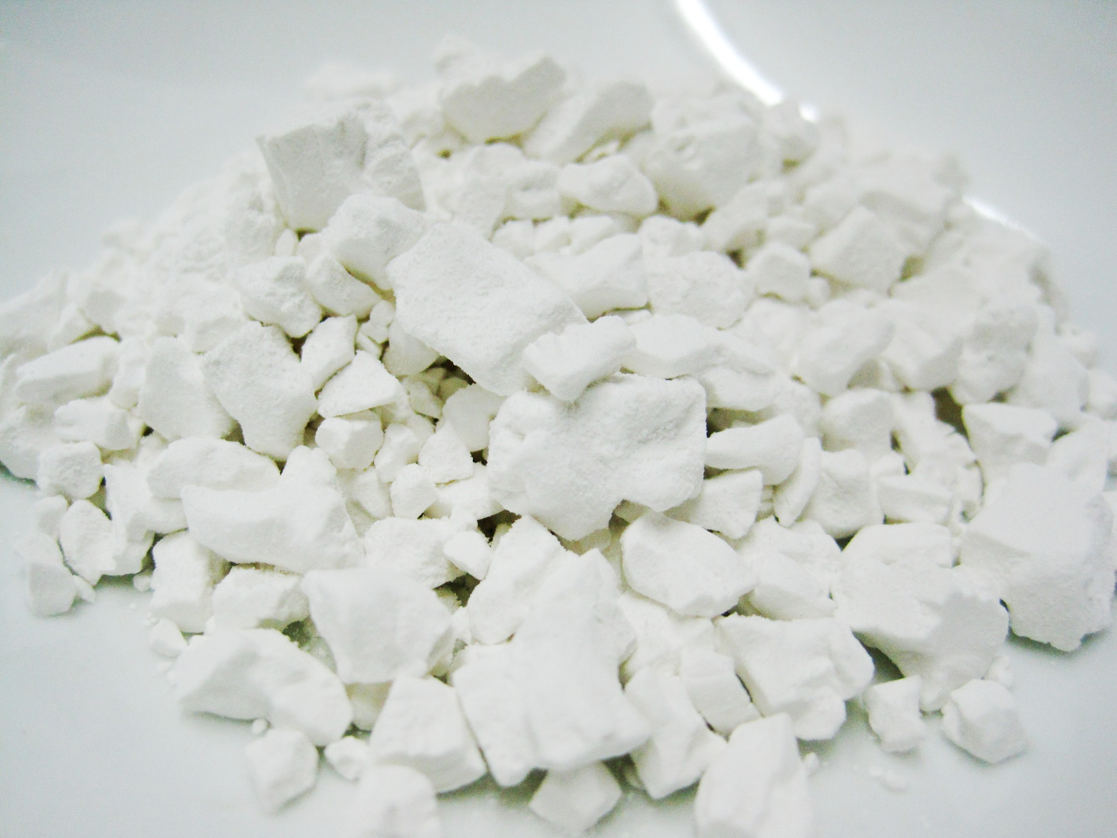 Kuzu prah, koristi se u kuhinji za zgušnjavanje jela